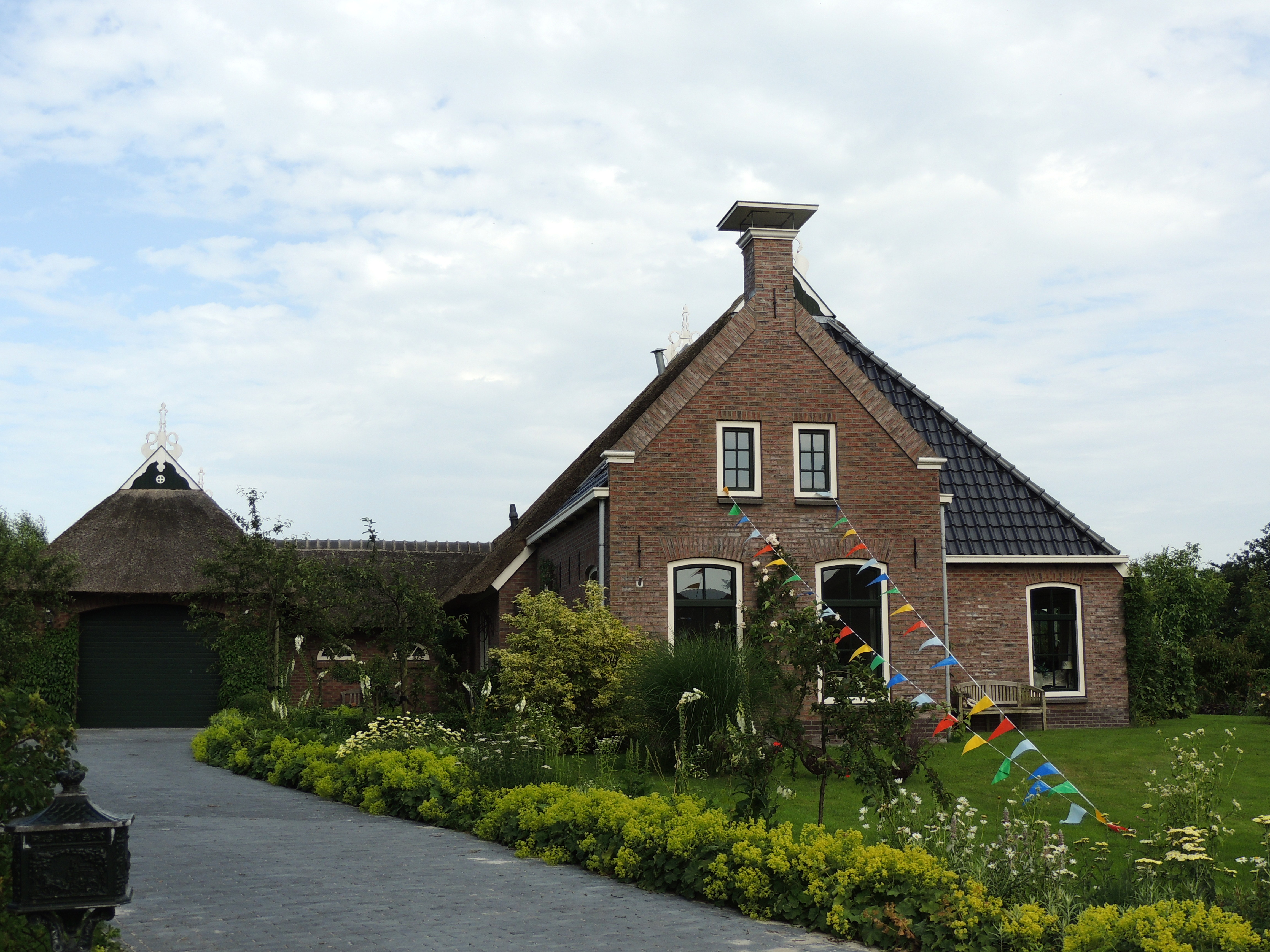 Boerderij in feeststemming. it Heechsân Oostermeer Fr.